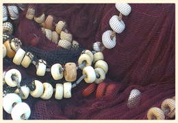 Santurtziko portuan dauden sareak.